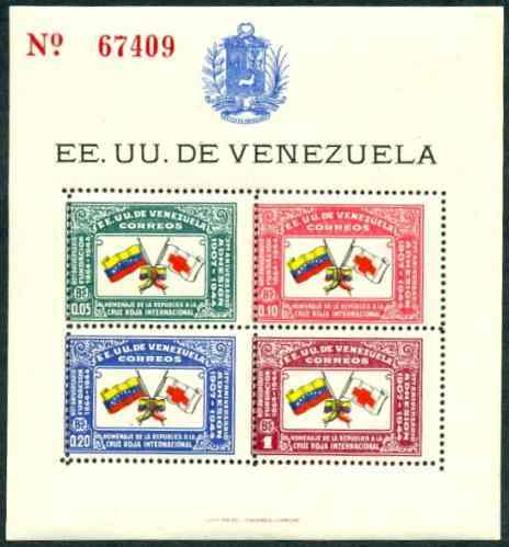 Estampillas de Venezuela hoja de recuerdo Cruz Roja año 1944. Nº de catálogo *según Aurelio Blanco:429 Blanco, Aurelio. 2009: Venezuela Catálogo especializado de estampillas. Caracas. 183p. ISBN 980-300-176-0